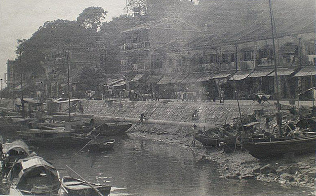 Aberdeen, Hong Kong, 1950s